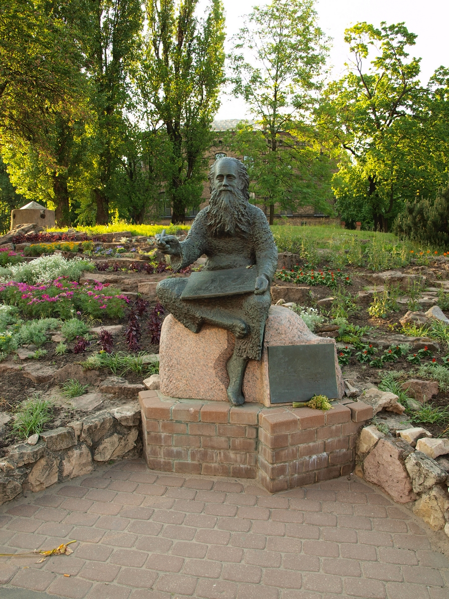 kaut kads dzejnieks a varbut zvejnieks